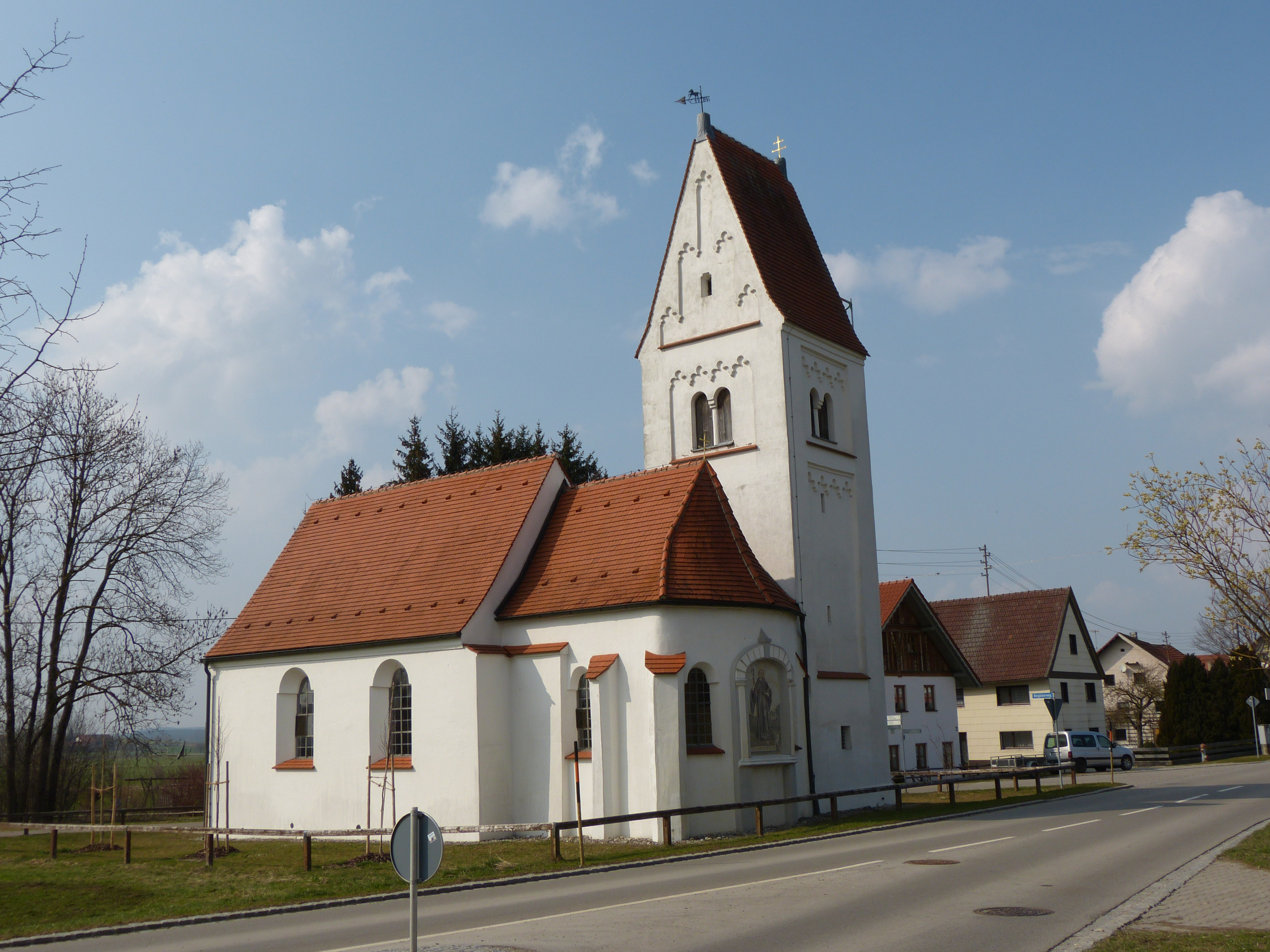 St. Leonhard, Gottenau, Gemeinde Markt Rettenbach, Landkreis Unterallgäu, Bayern